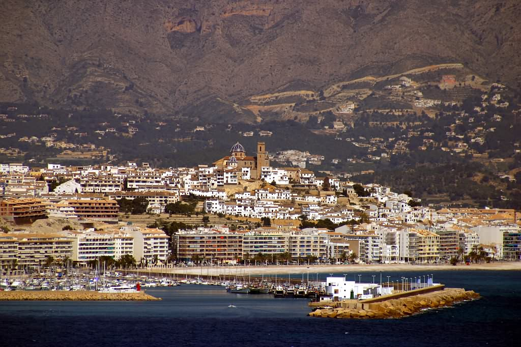 Ansicht von Altea, Spanien